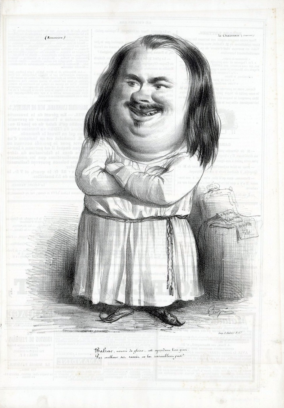 Caricature de Balzac par Benjamin Roubaud